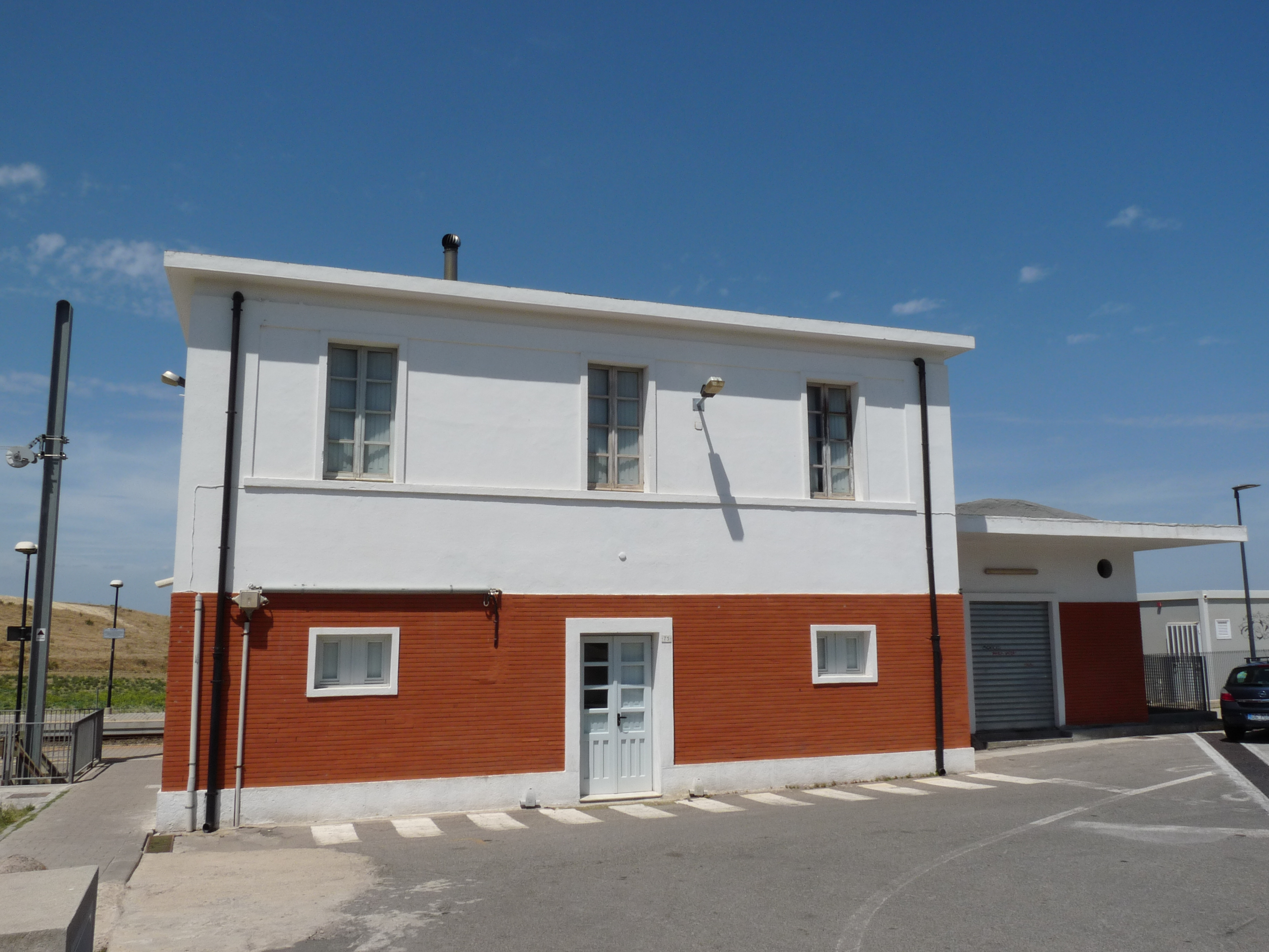 Het stationsgebouw van Settimo San Pietro